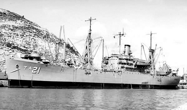 Transporte de Ataque Castilla fondeado en Cartagena